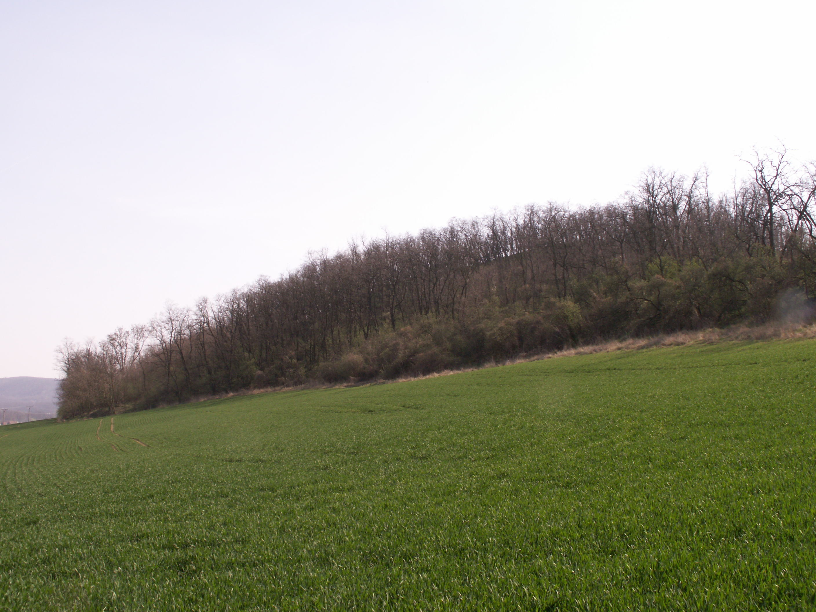 přírodní památka ev. č. 891, katastrální území Letkovice ve městě Ivančice v okrese Brno-venkov